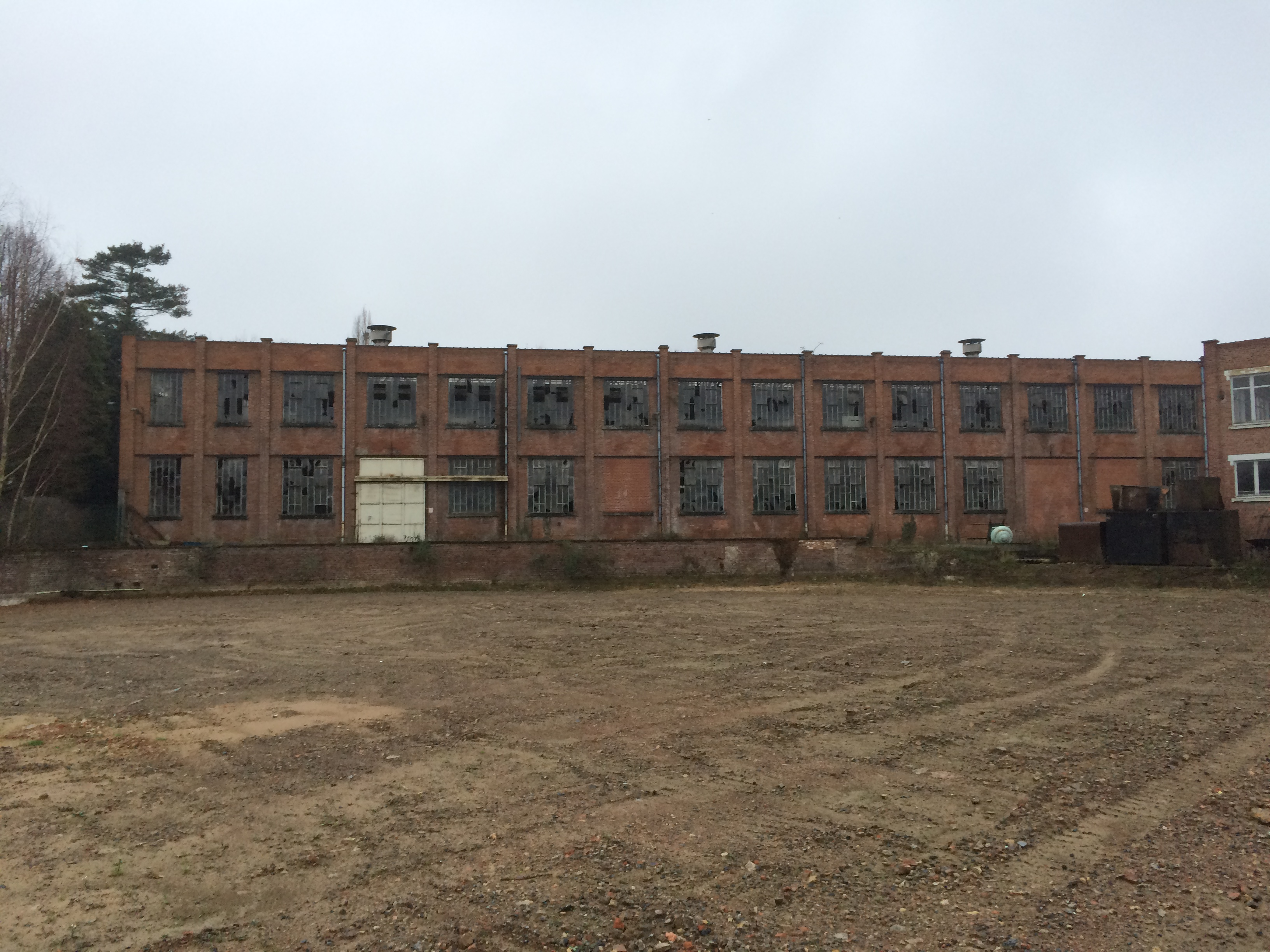 Bureaux S.A Câbleries et corderies du Hainaut vue depuis l'entrée pour camions